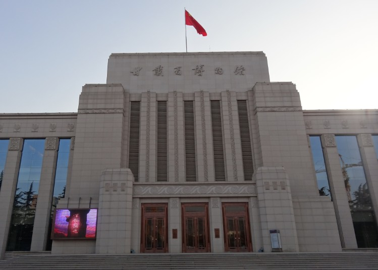 甘肃省博物馆新展览大楼，2006年12月26日正式对外开放